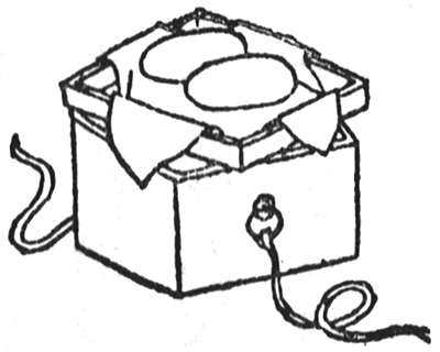 Heisarabasara (鮓荅) from the Wakan Sansai Zue (和漢三才図会)